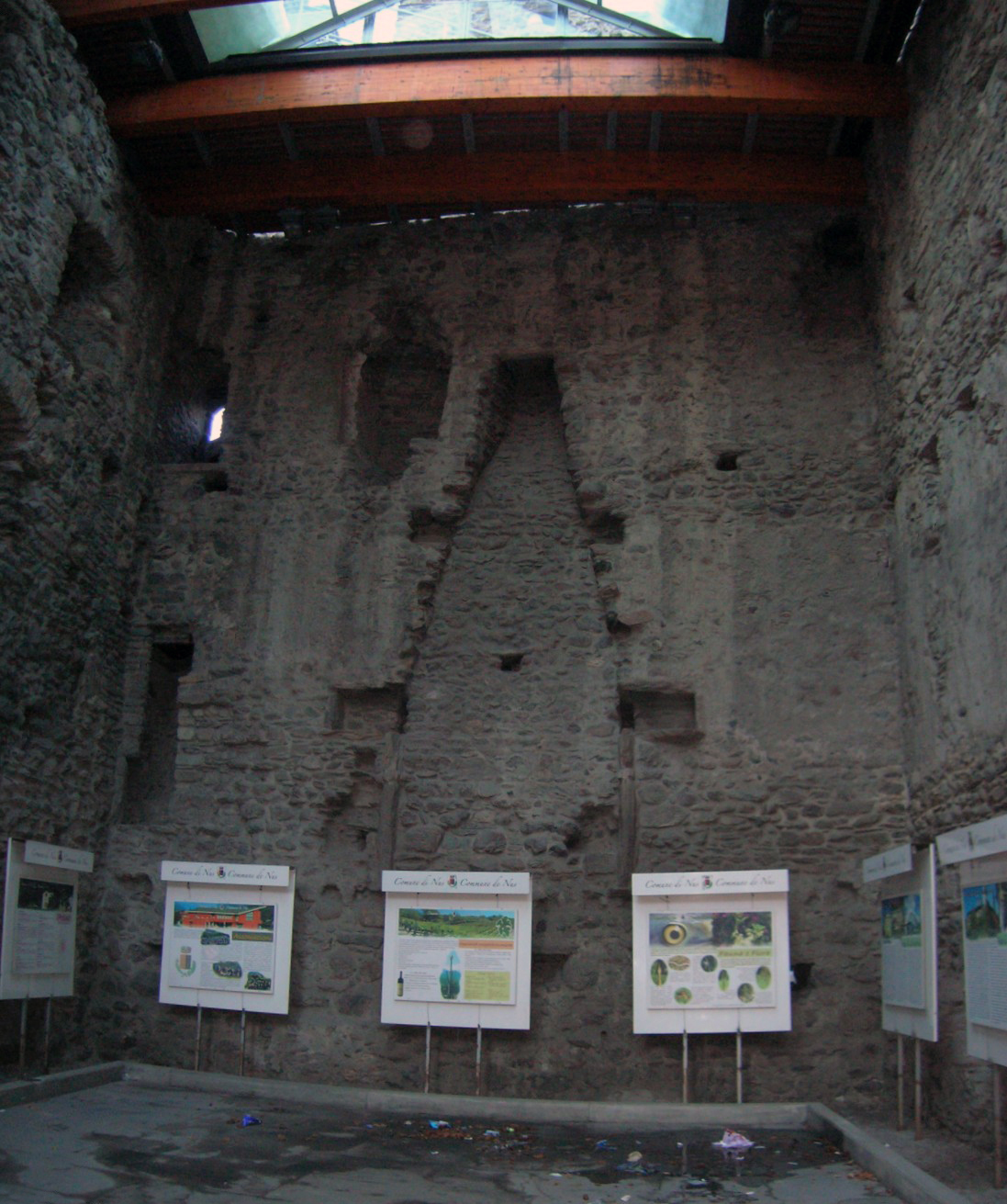 Interno Castello di Pilato, Nus, Valle d'Aosta, Italia